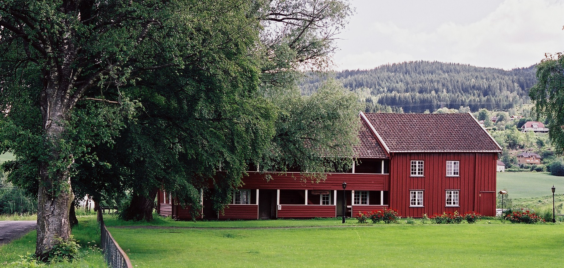 Forpakterbolig, Jevnaker prestegard, Oppland. 1600-tallet. Freda 1976.